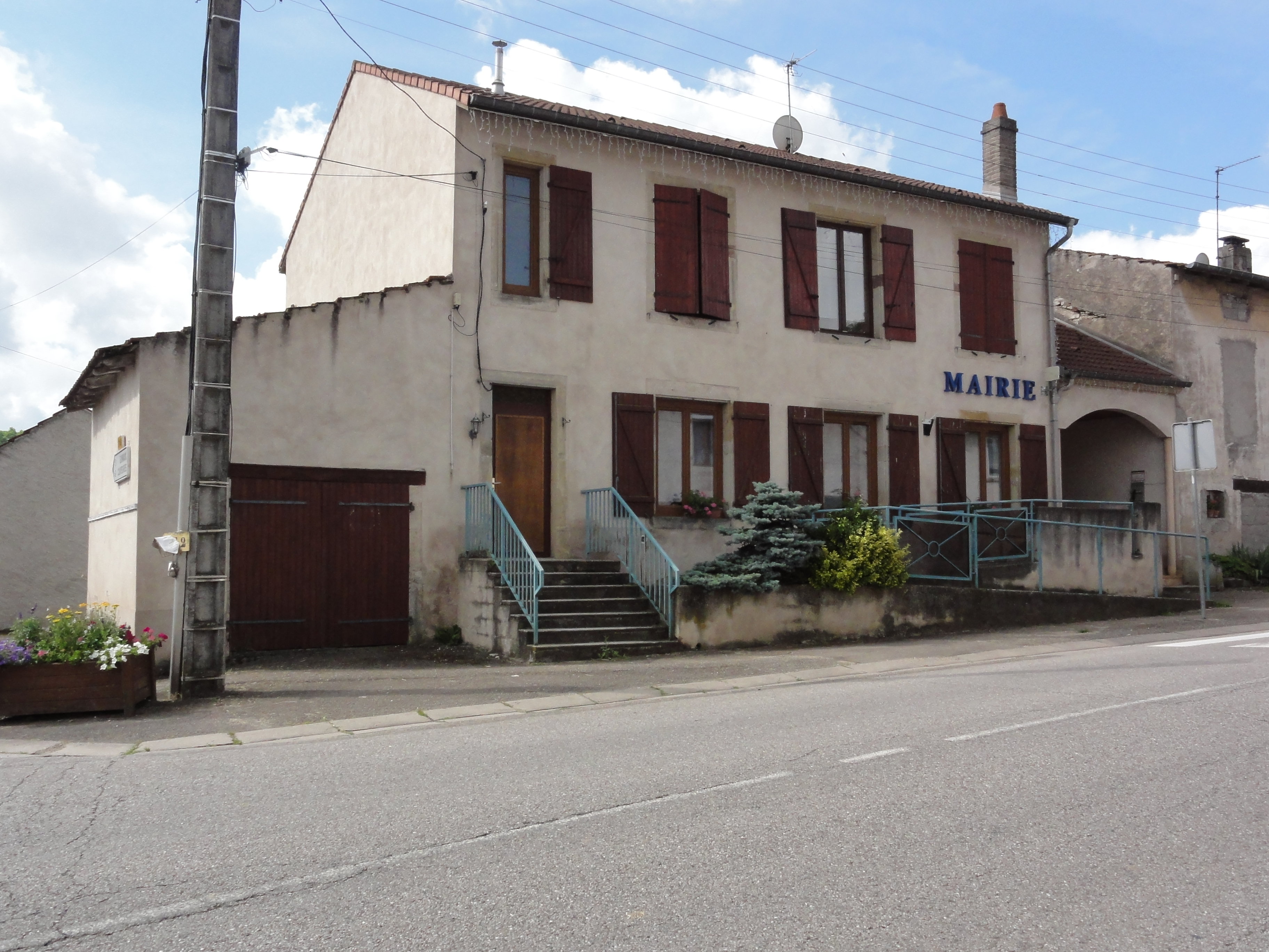 Méhoncourt (M-et-M) mairie